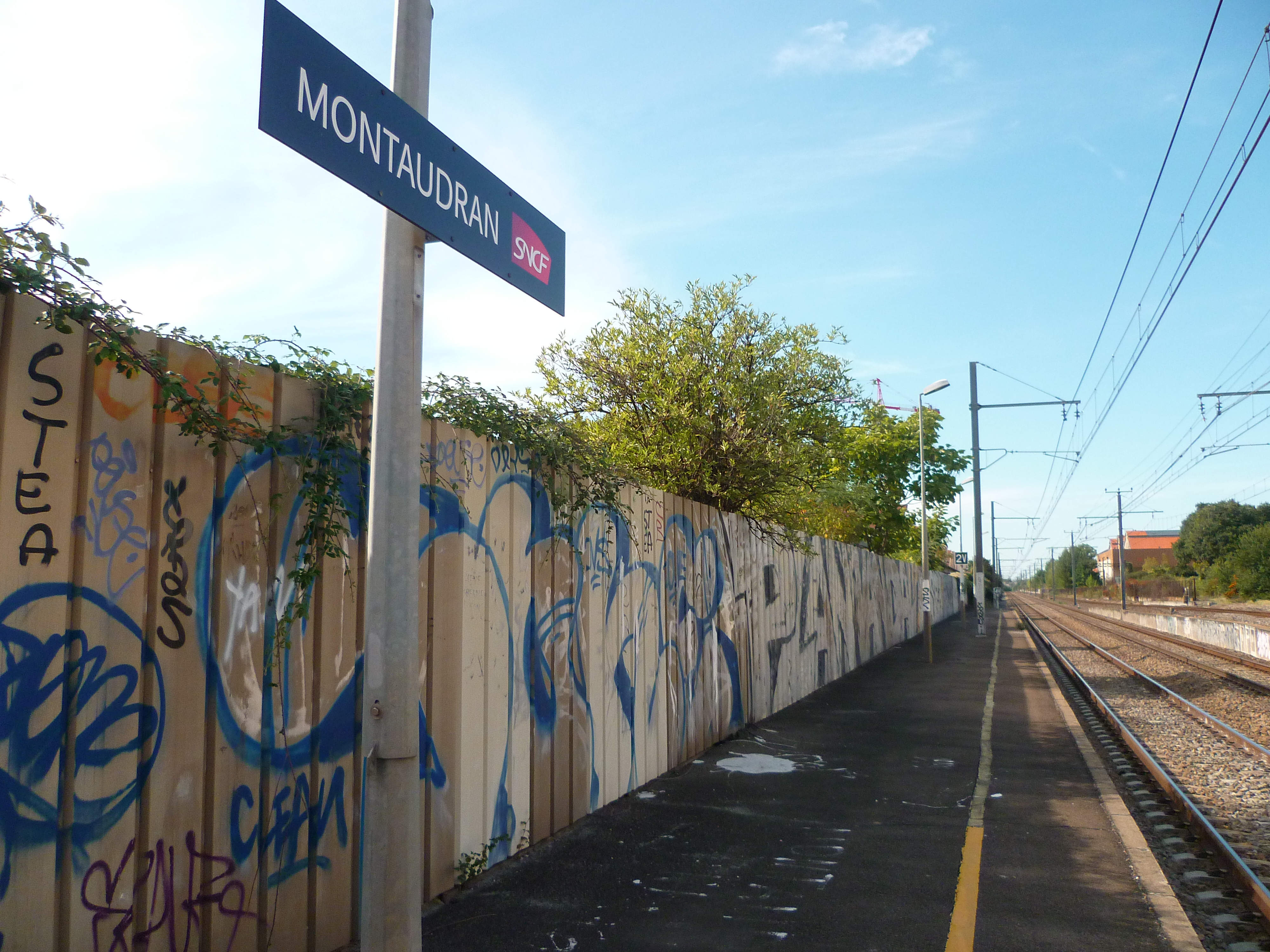 La gare de Montaudran à Toulouse (Haute-Garonne, France).